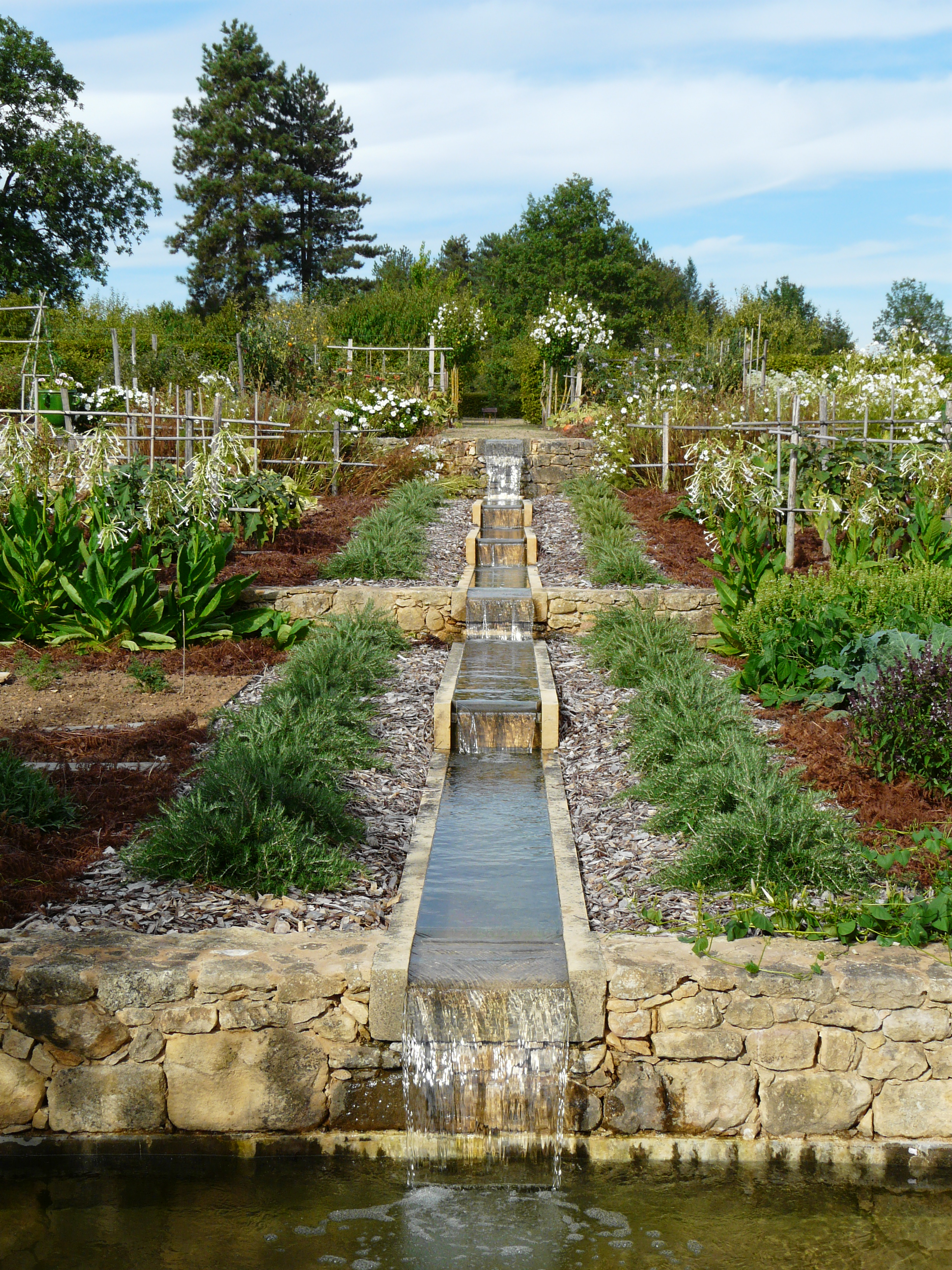 Le potager du manoir de Sautet, Molières, Dordogne, France.